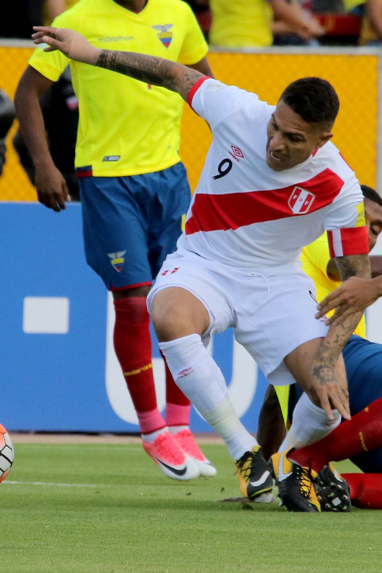 Quito 5 Sep (Andes).- Encuentro por eliminatorias Rusia 2018 entre Ecuador y Perú. Fotografías: Carlos Rodríguez/Andes.